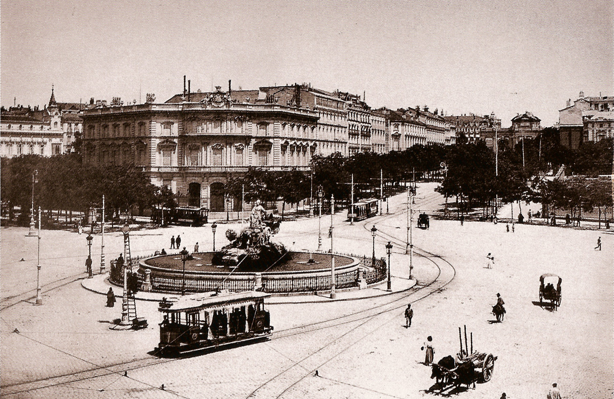 Plaza de Cibeles hacia 1900-1905, pues se ven tranvías eléctricos (que en 1890 no funcionaban todavía). Hauser y Menet